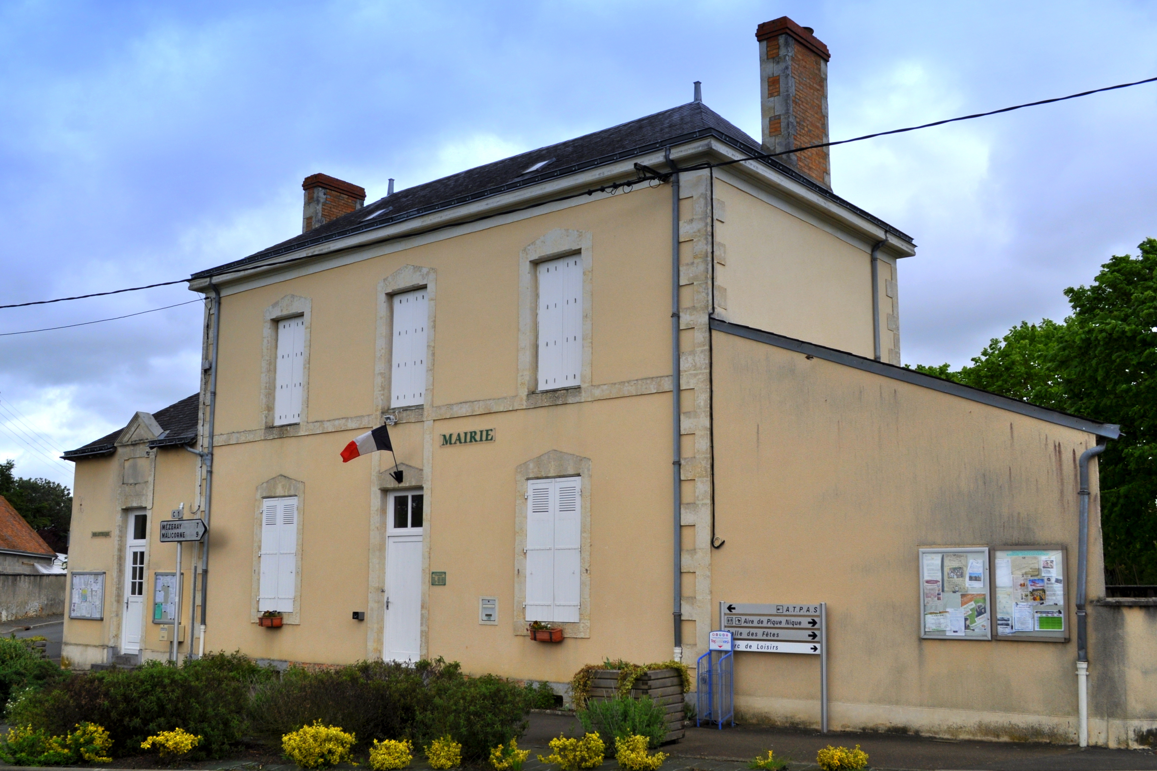 Mairie de Saint-Jean-du-Bois (Sarthe)